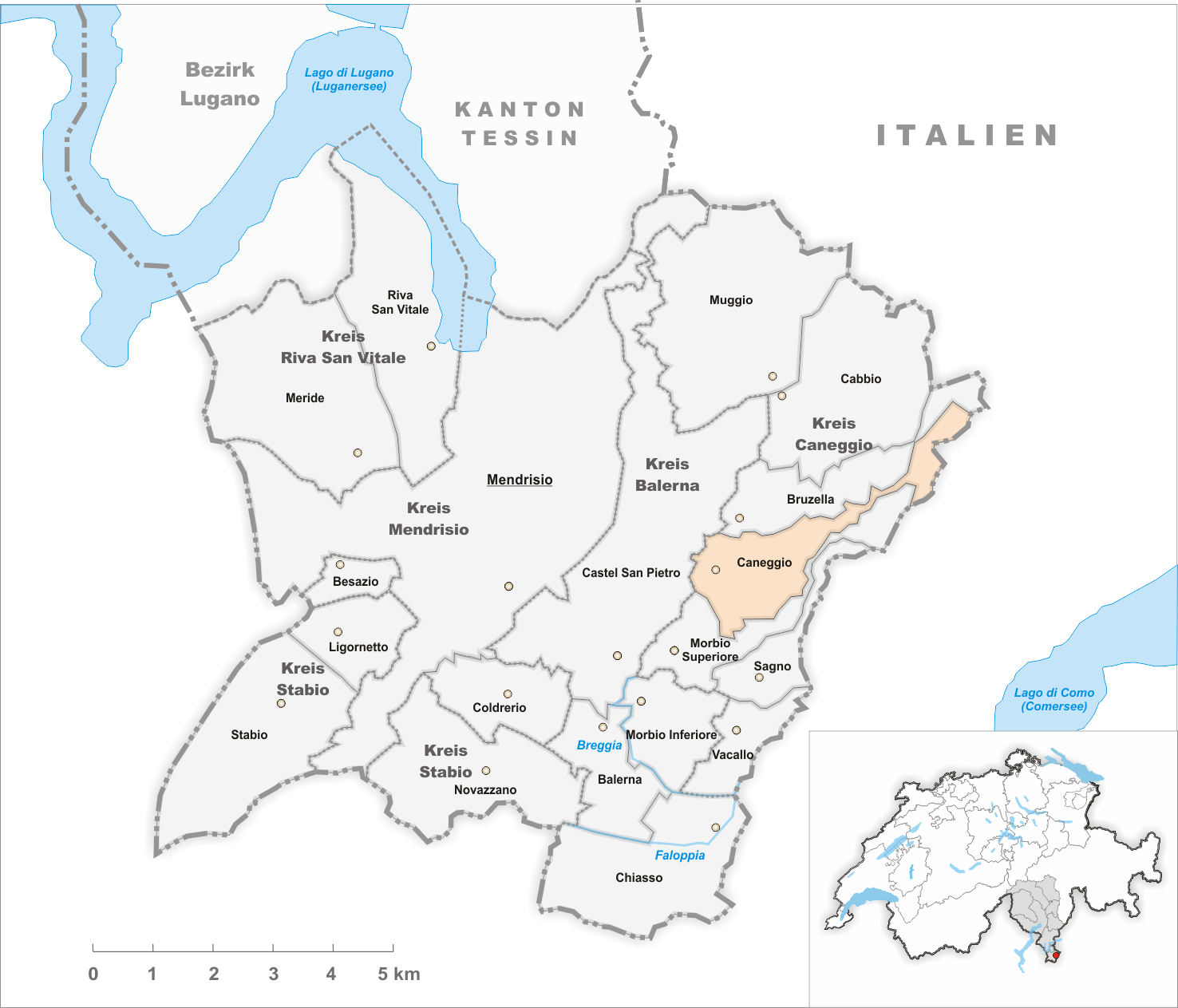 Municipality Caneggio Artist: Tschubby